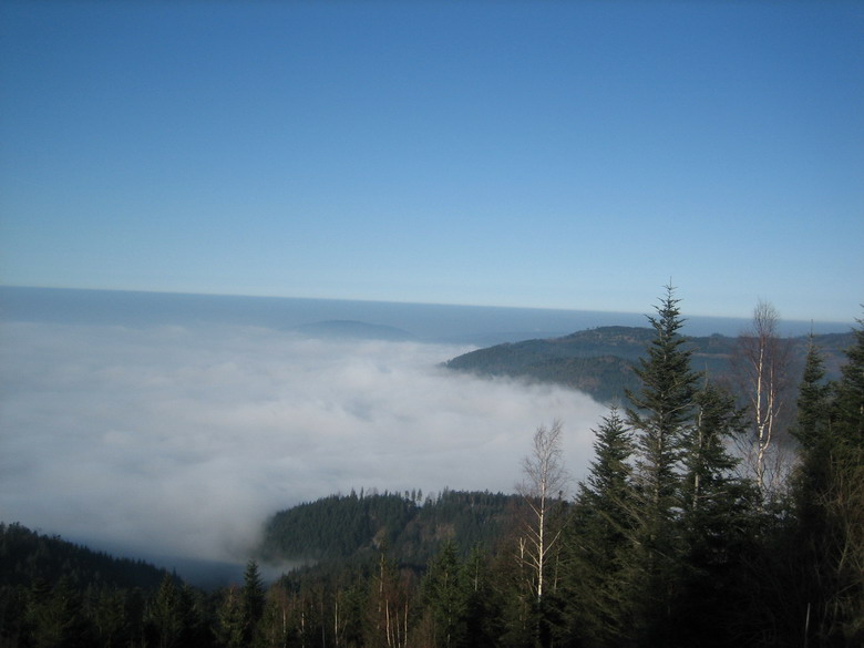 Blick auf Loffenau im Nebel, 24.12.2006, Michael Fieg